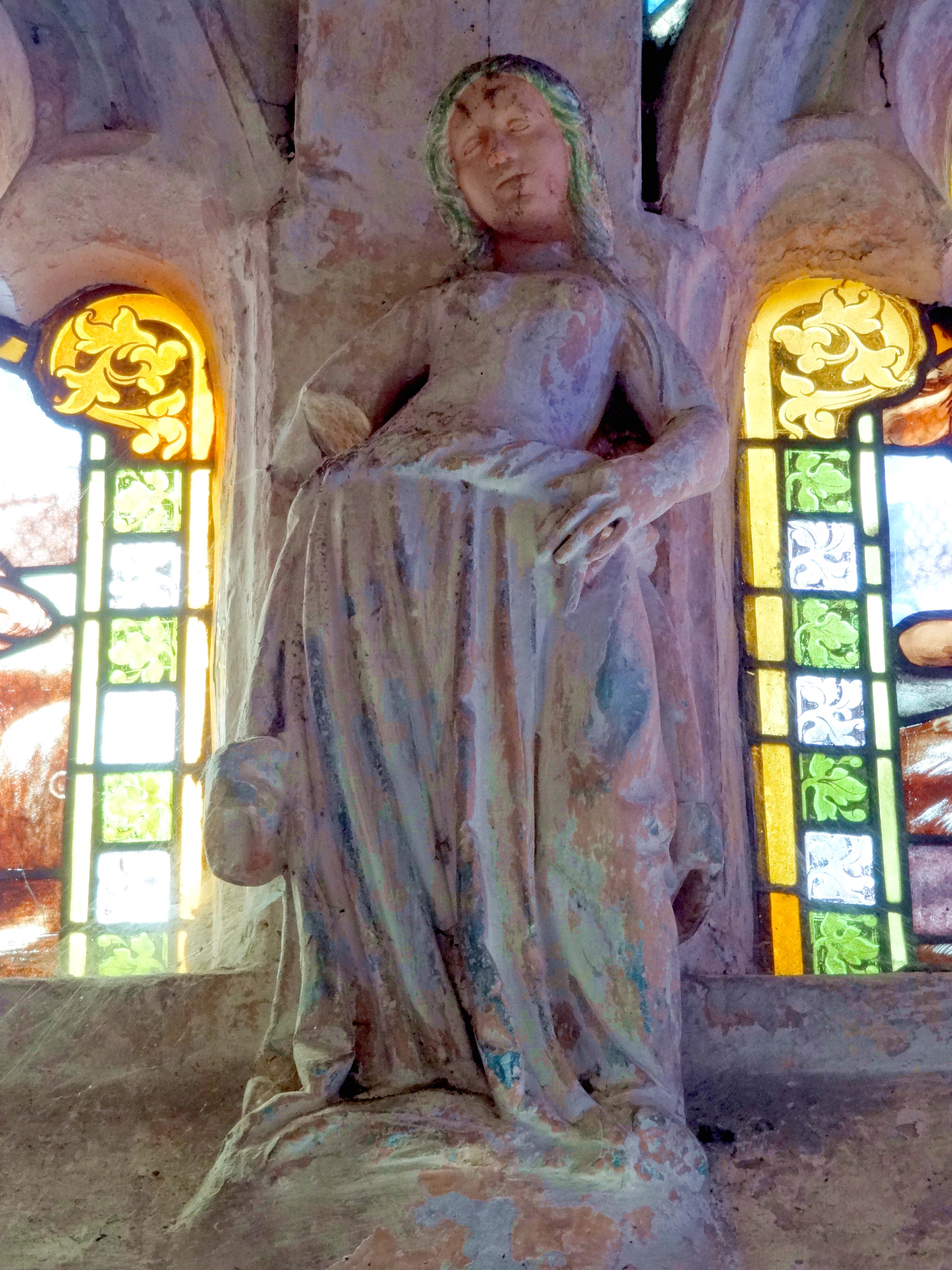 Mobilier de l'église - voir titre.